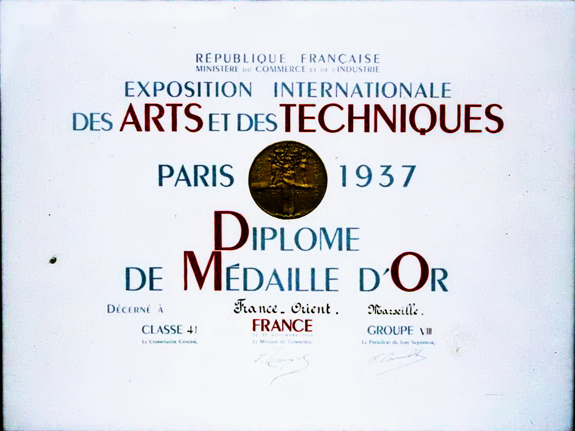 Le diplôme de médaille d'or lors de l'Exposition Internationale des Arts et des Techniques en 1937 est décerné à la Société Tapis France Orient à Marseille dirigée par Zareh Tchouhadjian. Créée en 1923. Fabrication de tapis d'Orient avec une main d’œuvre de réfugiés arméniens.